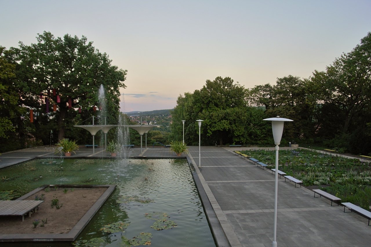 egapark Erfurt Liliengarten